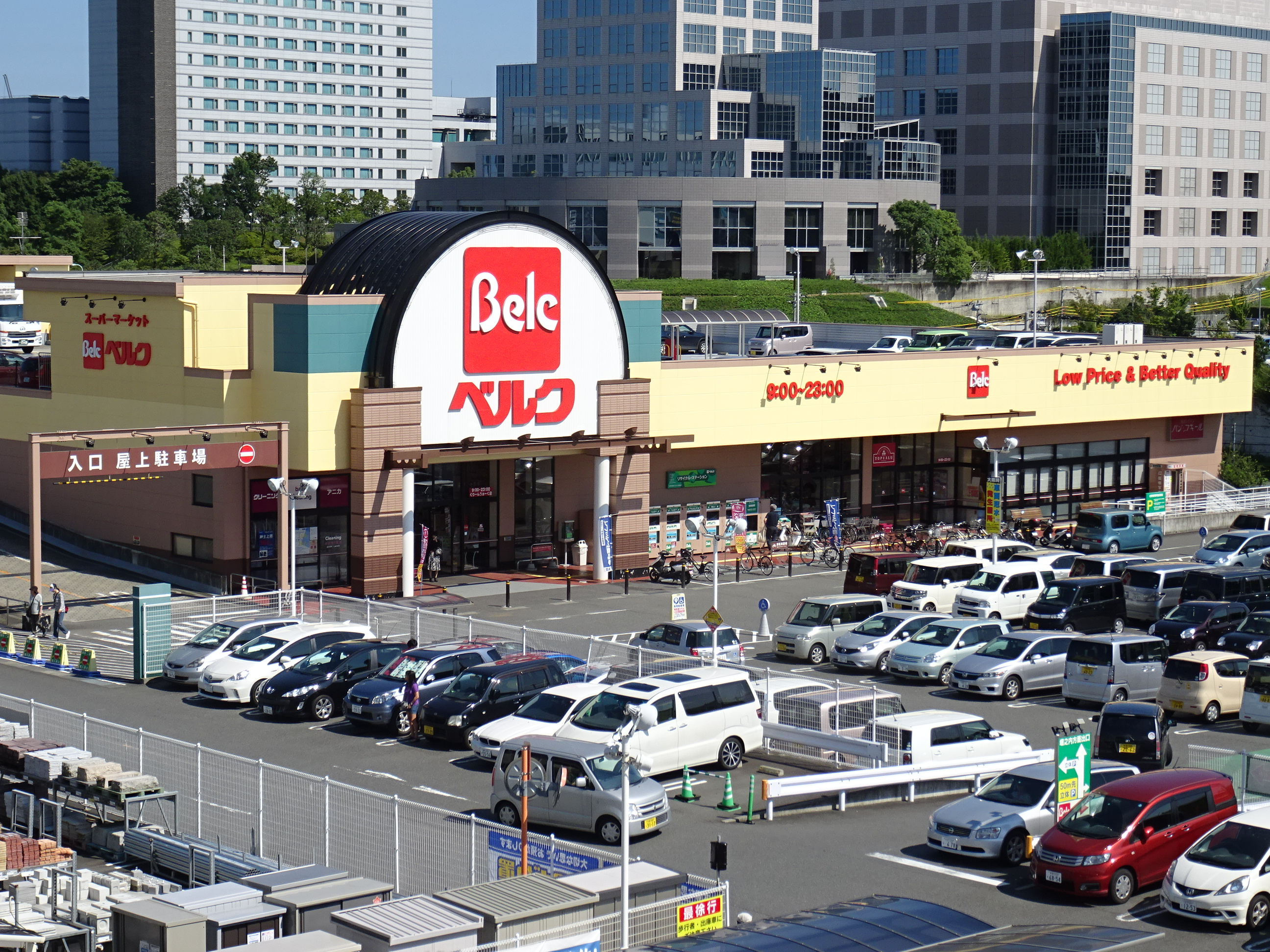 多摩ニュータウンにある「ベルクぐりーんうぉーく多摩店」（2015/09/20撮影）